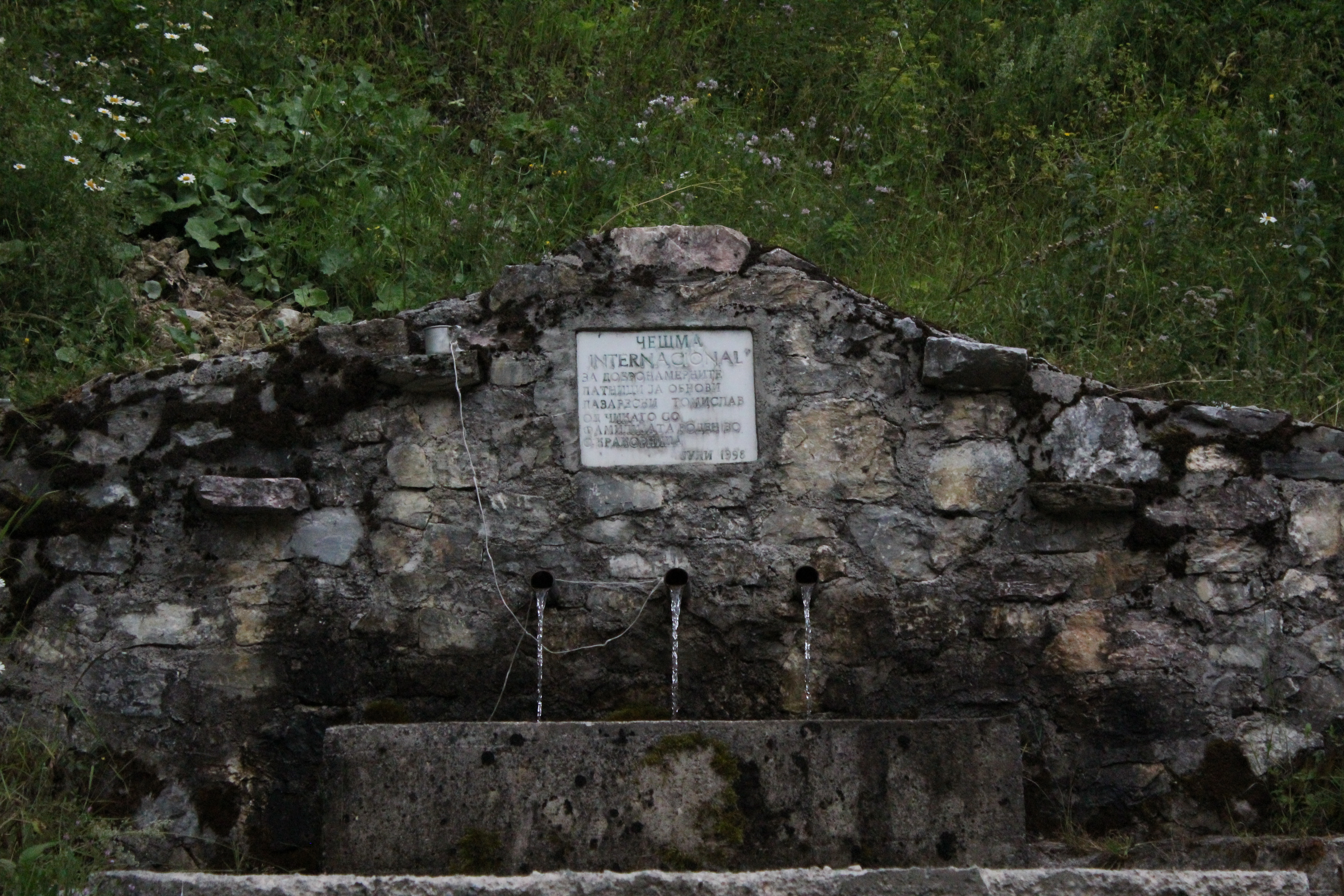 Sarena cesma, Macedonia.